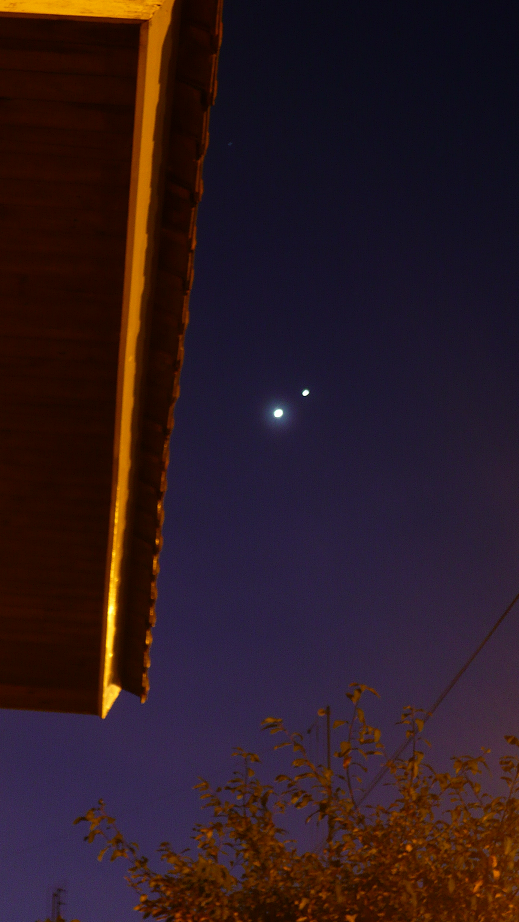 Conjunción planetaria entre Júpiter y Venus en el cielo de Mar del Plata, Argentina.